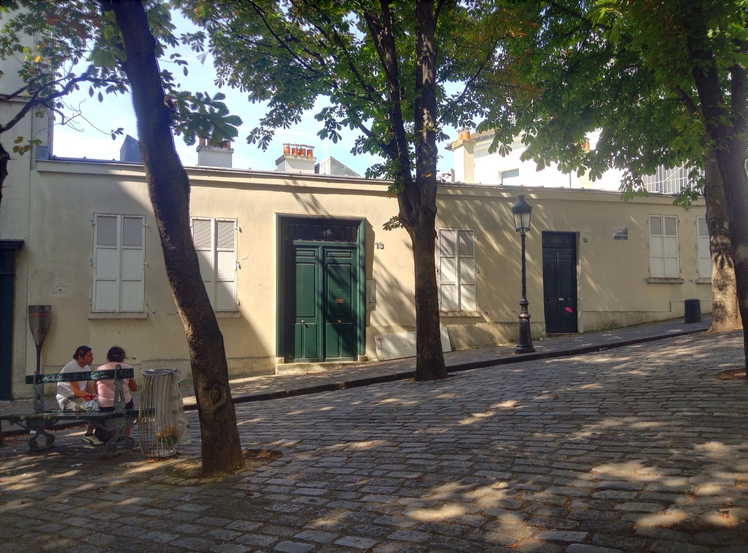 La façade avant du Bateau-Lavoir, célèbre cité d'artistes parisienne ayant accueilli notamment Picasso et Modigliani, correspond au deuxième étage de la façade arrière, la dénivellation de terrain commandant la distribution intérieure originale.